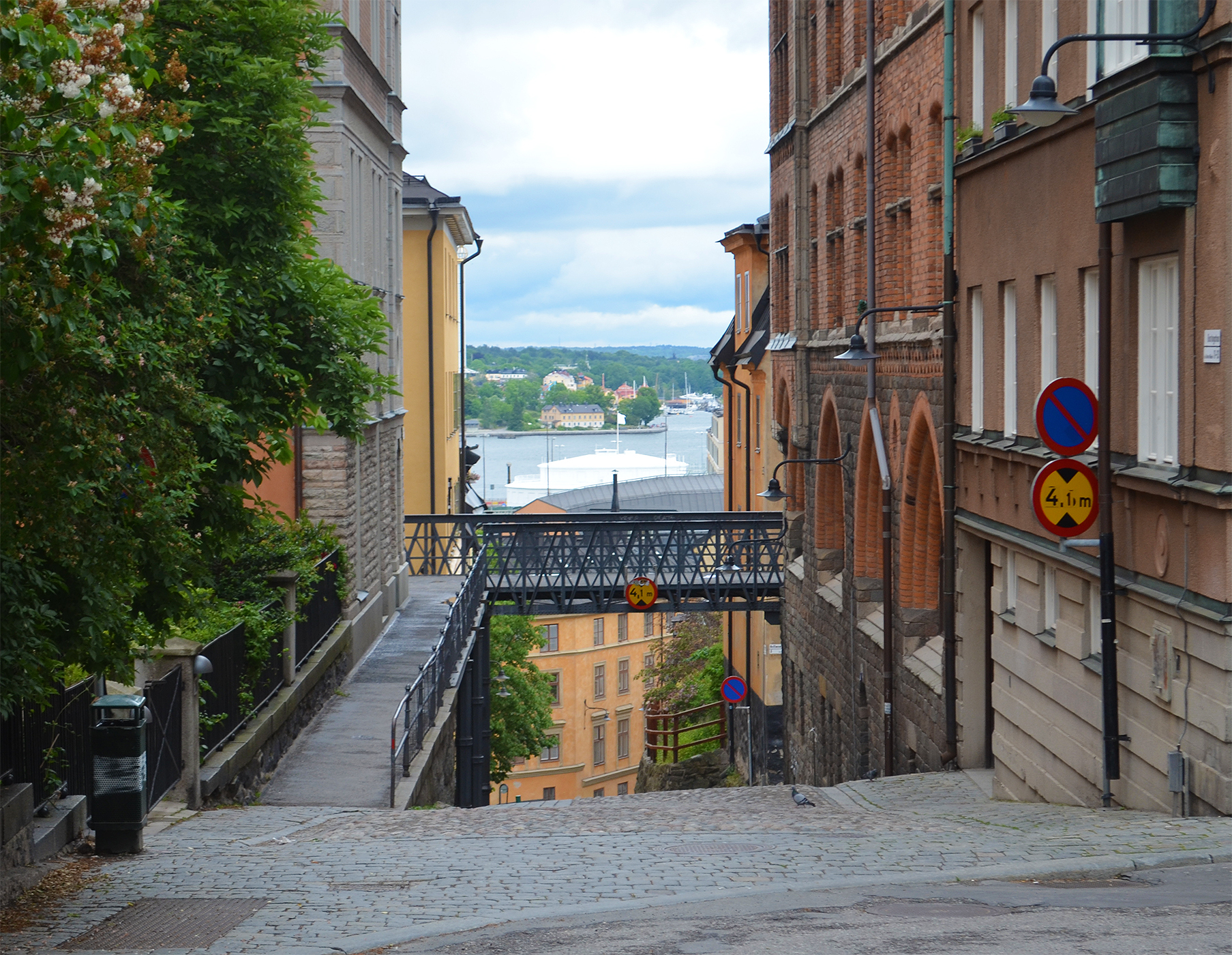 Bastugatan